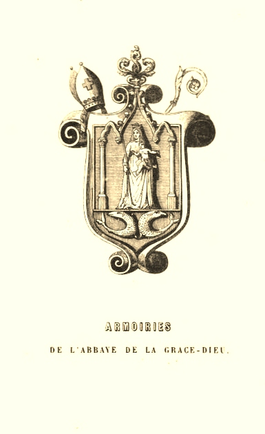 Armoiries de l'Abbaye de la grâce-Dieu